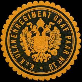 Sealing stamp Title: K.u.K. Ulanenregiment Graf Paar No. 13 Description: gelb, schwarz, geprägt Place: size: 4 cm